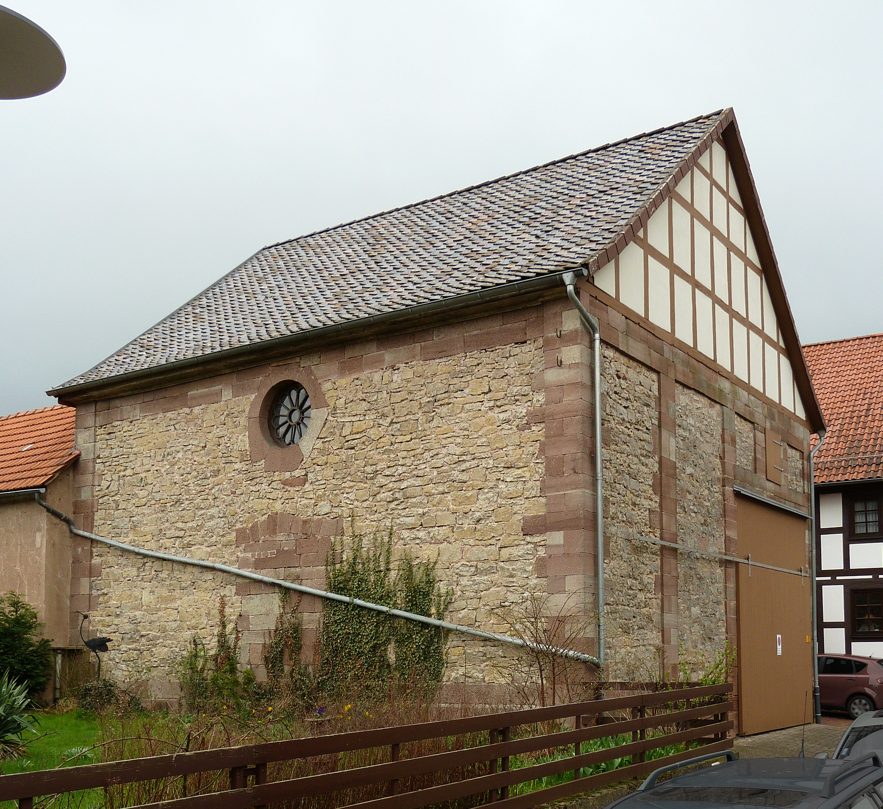 Nordostansicht des ehemaligen Synagogengebäudes der jüdischen Gemeinde in Hebenshausen, Gemeinde Neu-Eichenberg, Nordhessen